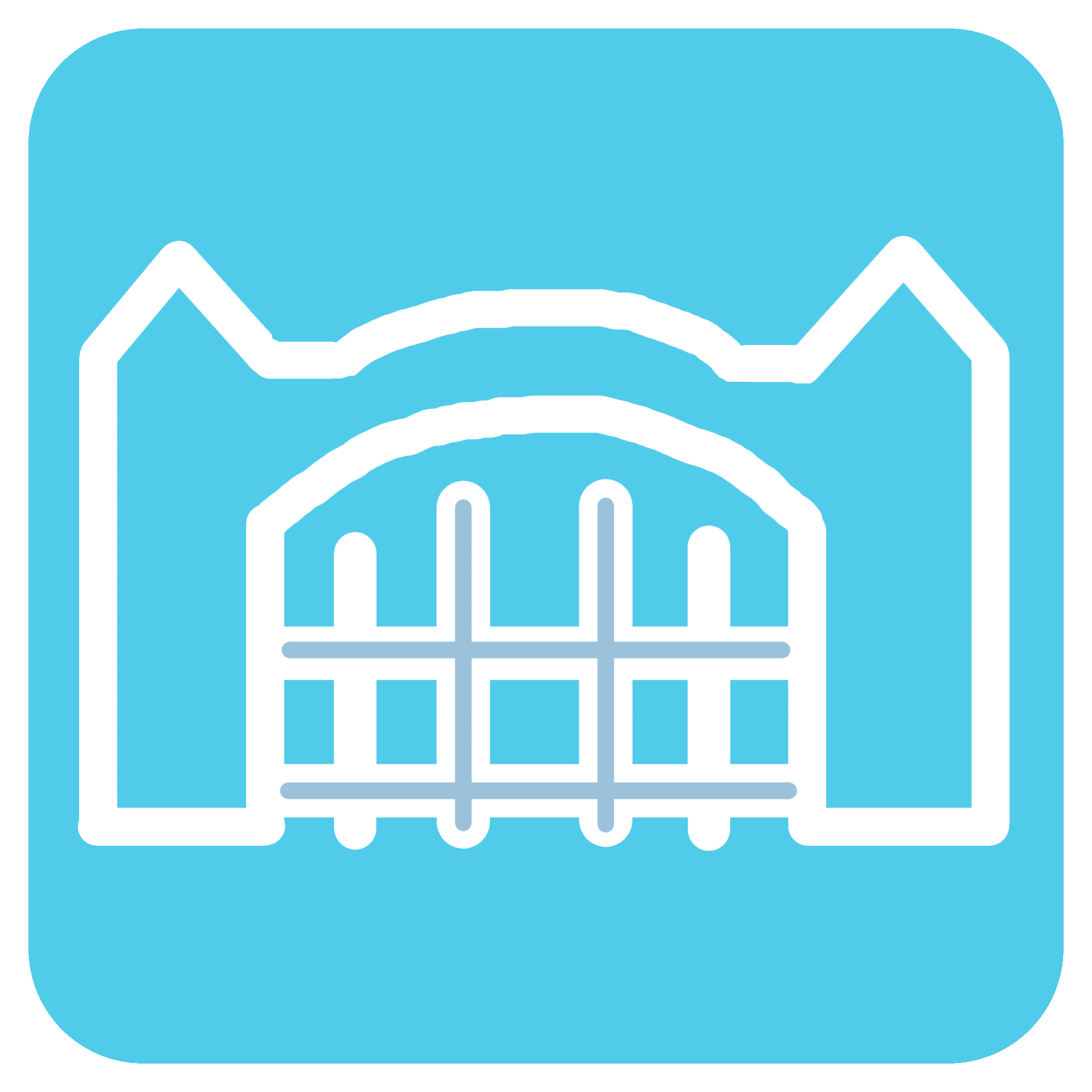 Símbolo utilizado para identificar a la estación Maestranza en 2001.